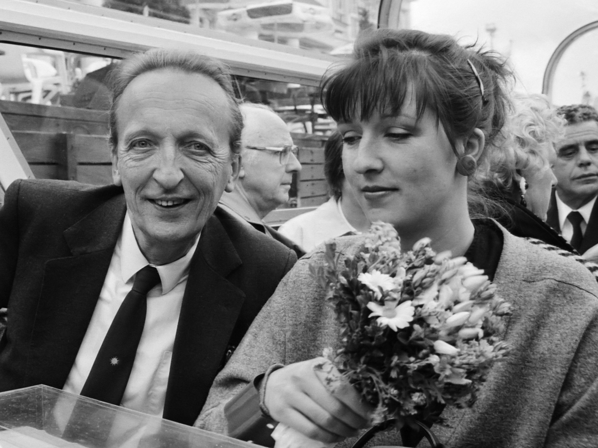 Pierre Janssen met dochter Evelyne in naar hem genoemde "Museumschool" die zojuist in Amsterdam gedoopt is 11 mei 1987